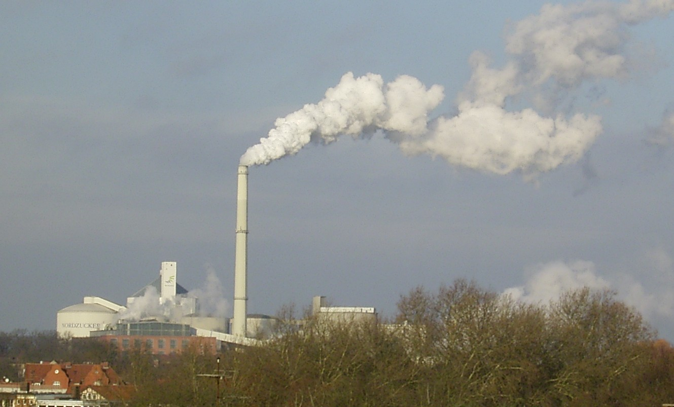 Blick auf die Nordzucker-Fabrik in Uelzen während der Zuckerrüben-Kampagne